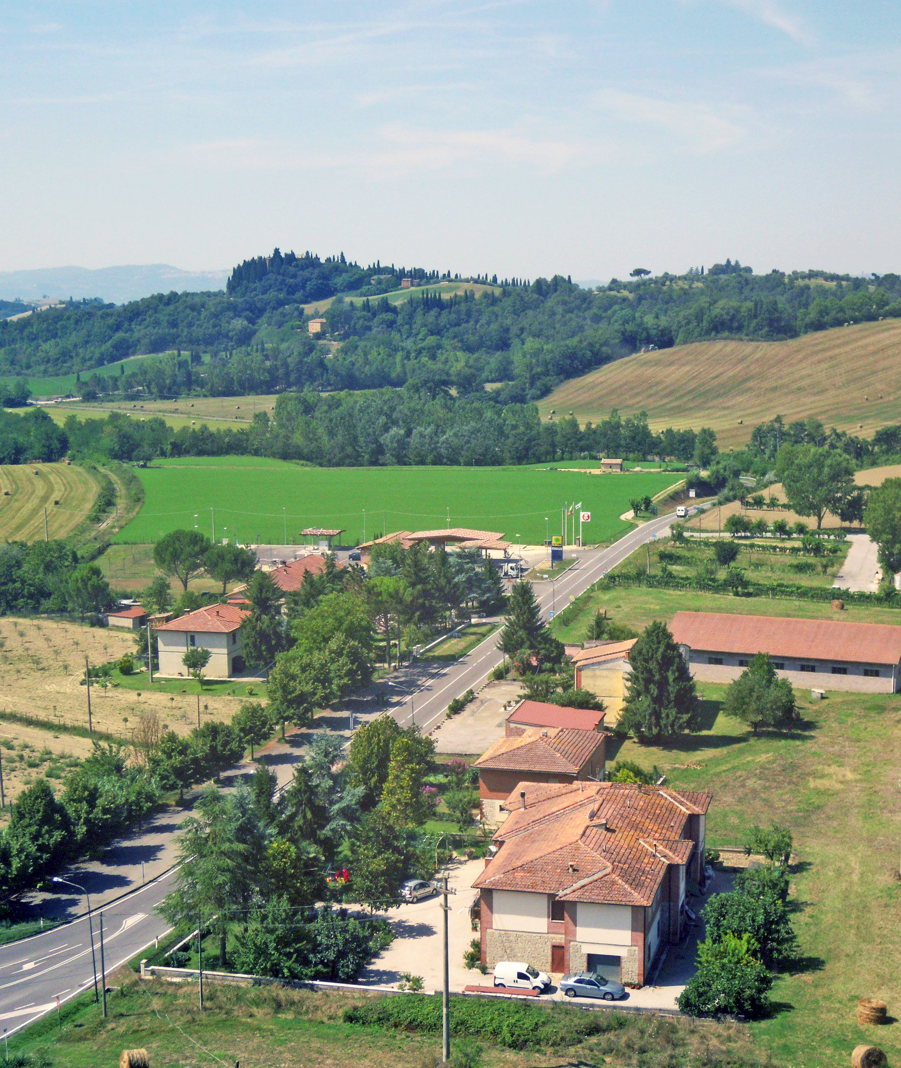 Veduta verso Torrenieri da San Giovanni d'Asso